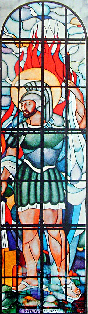 Witraż z wizerunkiem św. Floriana w kościele Imienia Maryi w Bączalu Dolnym, zaprojektowany przez Zygmunta Czyża